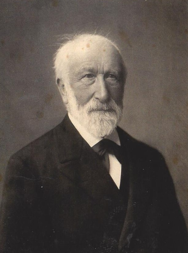 Porträtfotografie von Wilhelm Hans Ahlmann